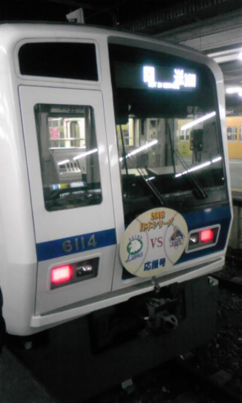 西武ドームでの日本シリーズ開催期間中、専用ヘッドマークを掲げられた西武6000系。（西武球場前駅にて撮影）